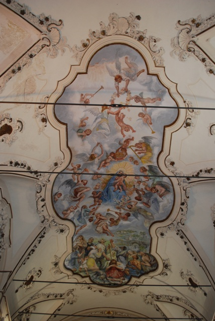 Affresco rappresentante la glorificazione della Madonna dei Miracoli. Santuario della Madonna dei Miracoli (Alcamo) di A.Abate, 1947